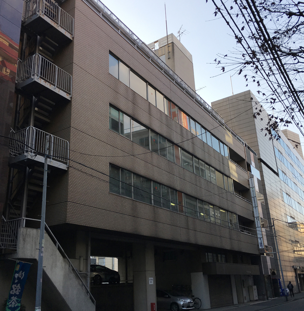 会社外観画像